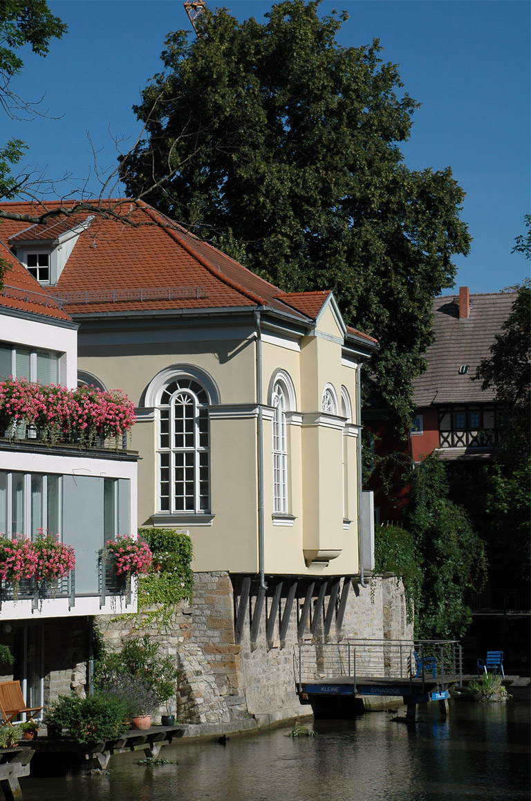 Kleine Synagoge (errichtet zwischen 1839 und 1840), An der Stadtmünze in Erfurt